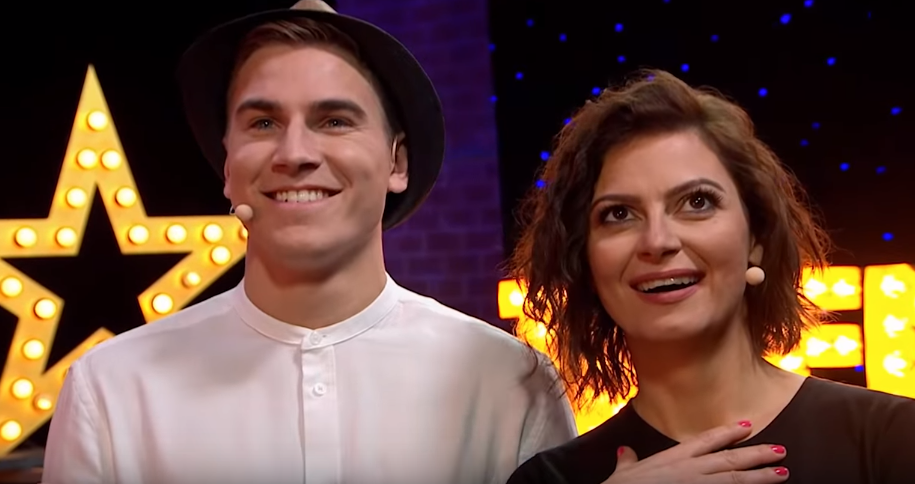 Moderátoři během vystoupení Václava Svobody v Česko Slovensko má talent 2019